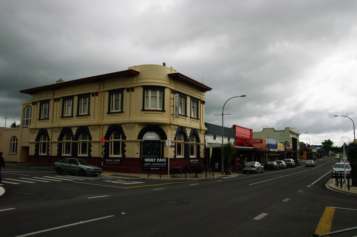 Hauptstraße von Dannevirke, Neuseeland